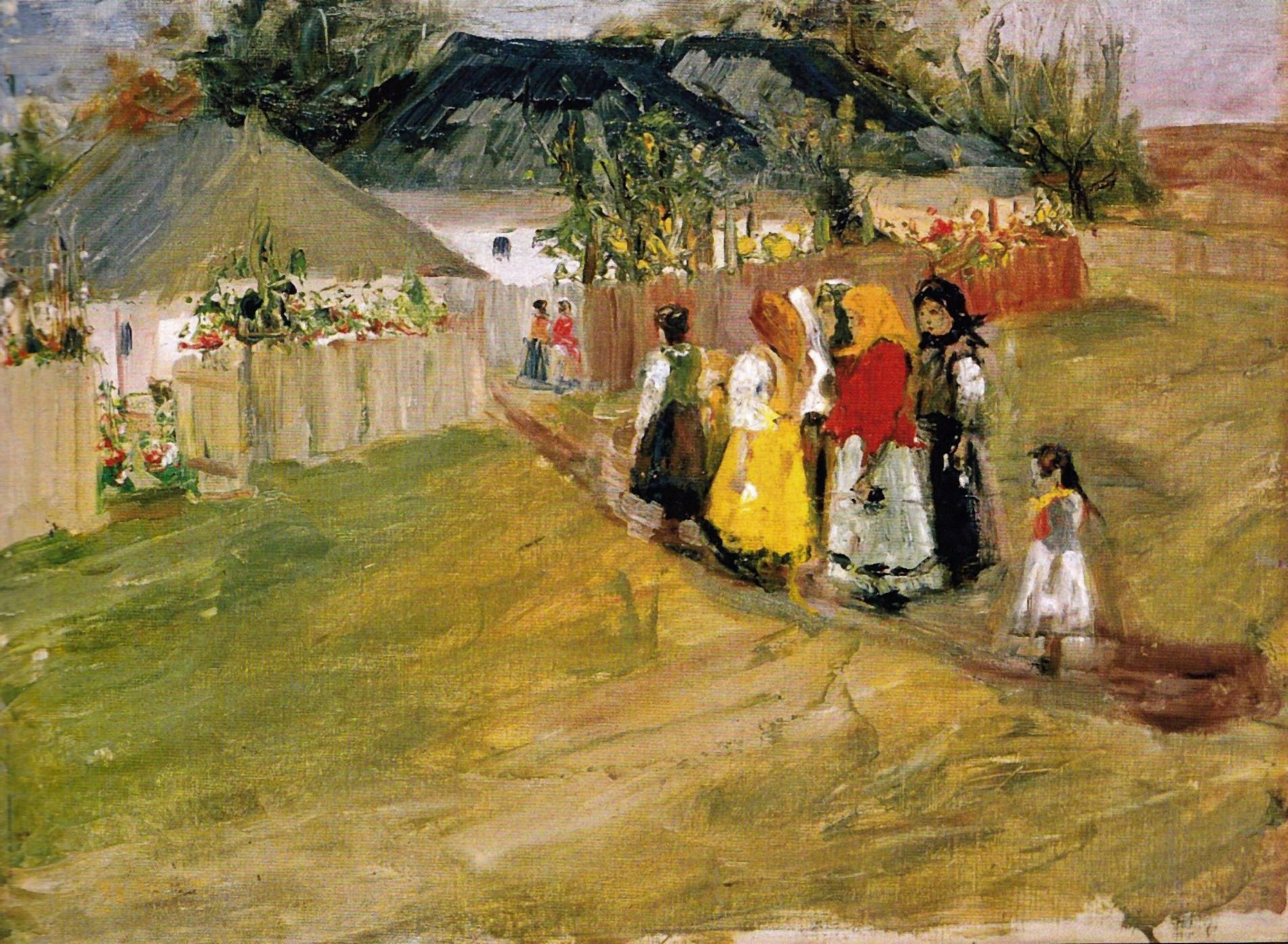 La sârbi